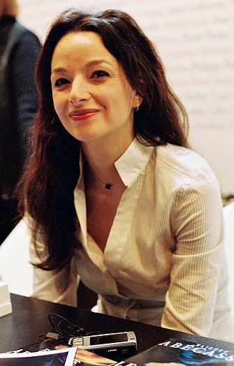 Eliette Abécassis au Salon du livre de Paris 2009.